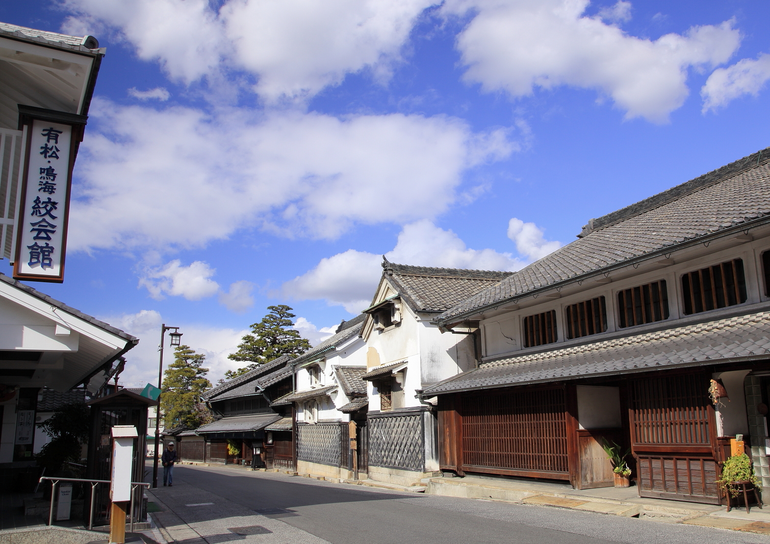 有松の歴史的町並み（名古屋市緑区、2014年）